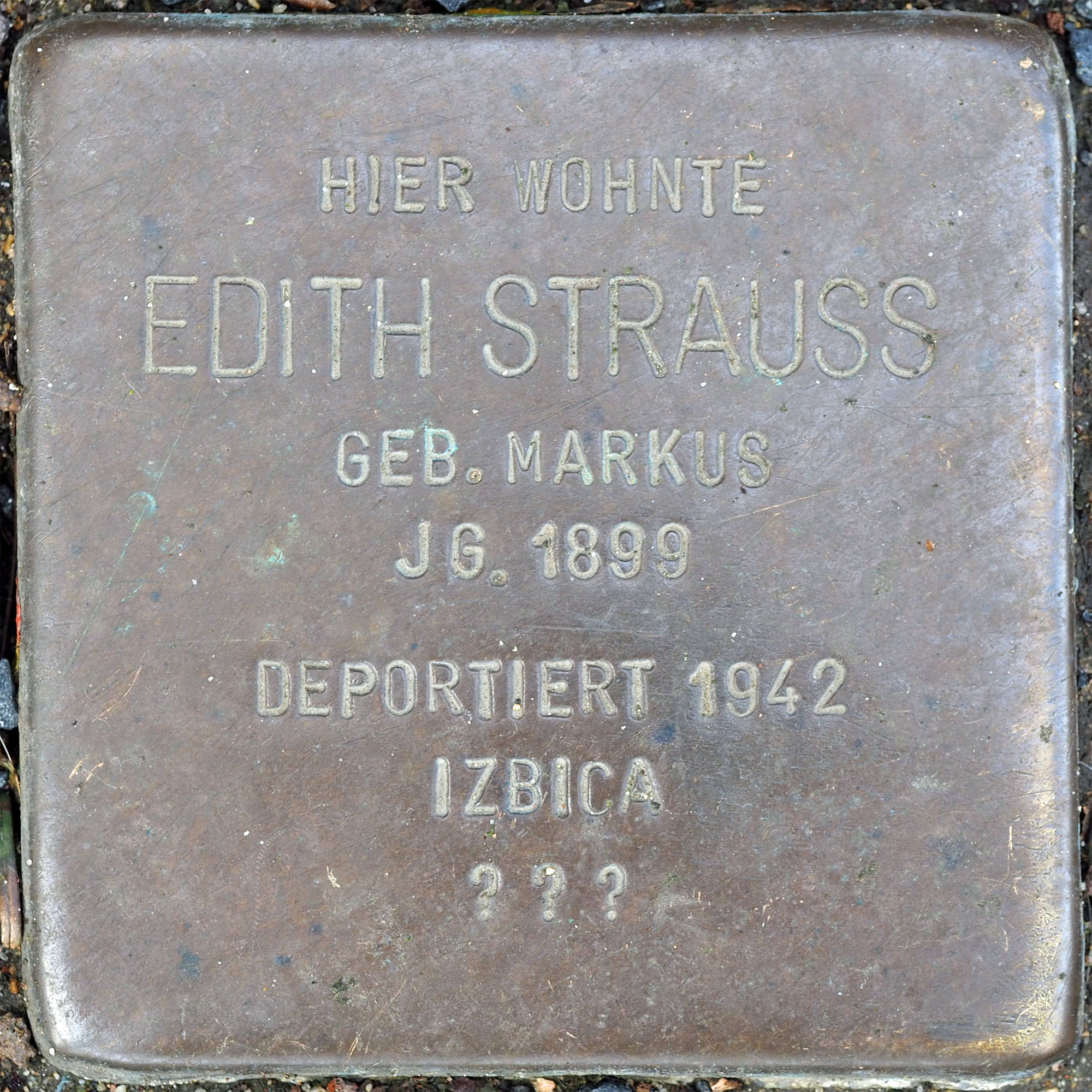 Stolpersteine MG: Strauss, Edith